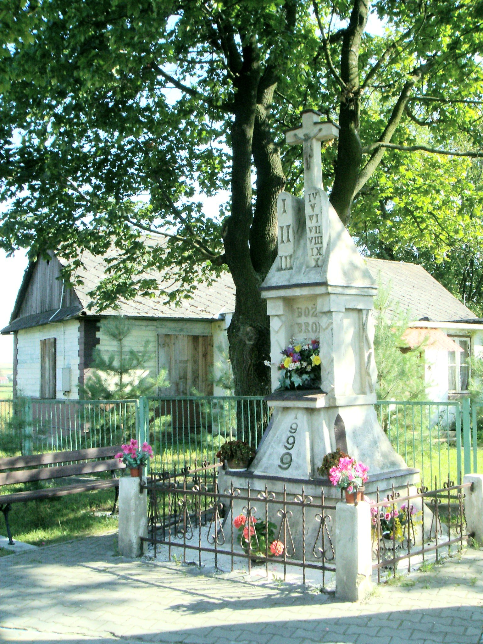 Mokre k. Zamościa. Stara szkoła podstawowa i kapliczka z 1999 r.